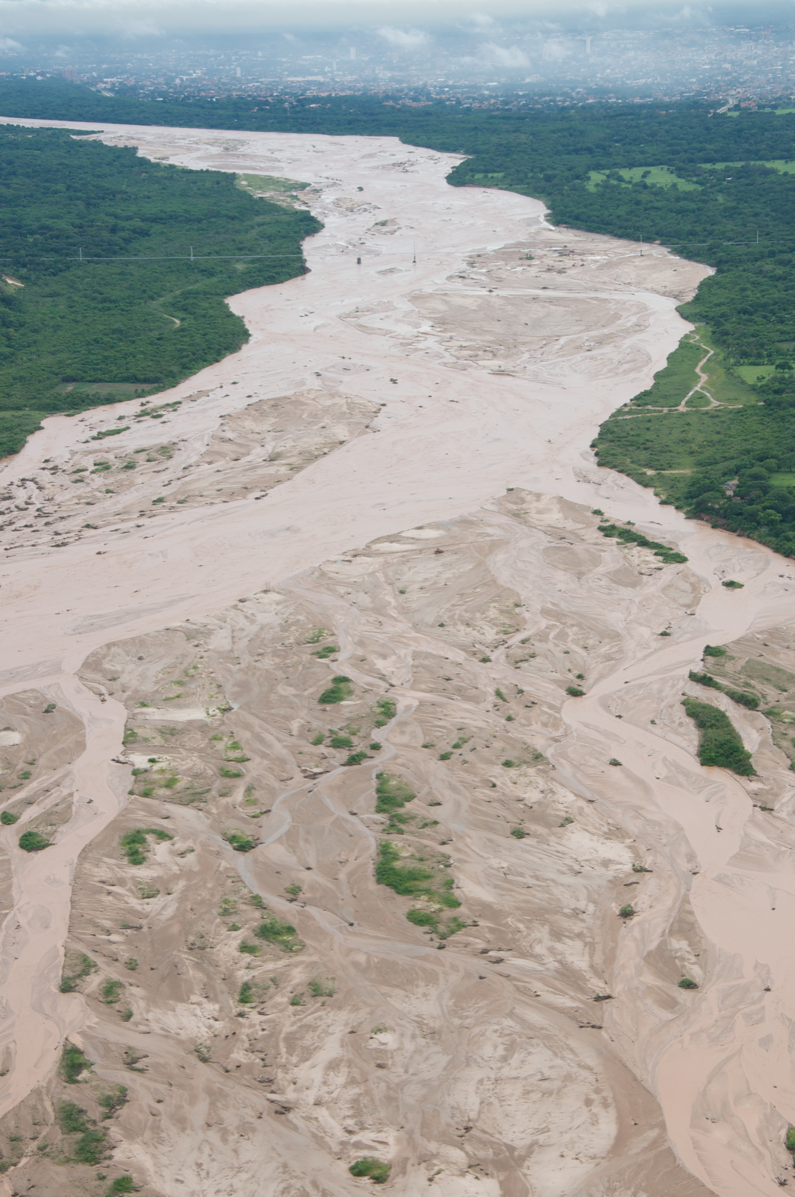 vista aerea del río Piraí con la ciudad de Santa Cruz de la Sierra al fondo